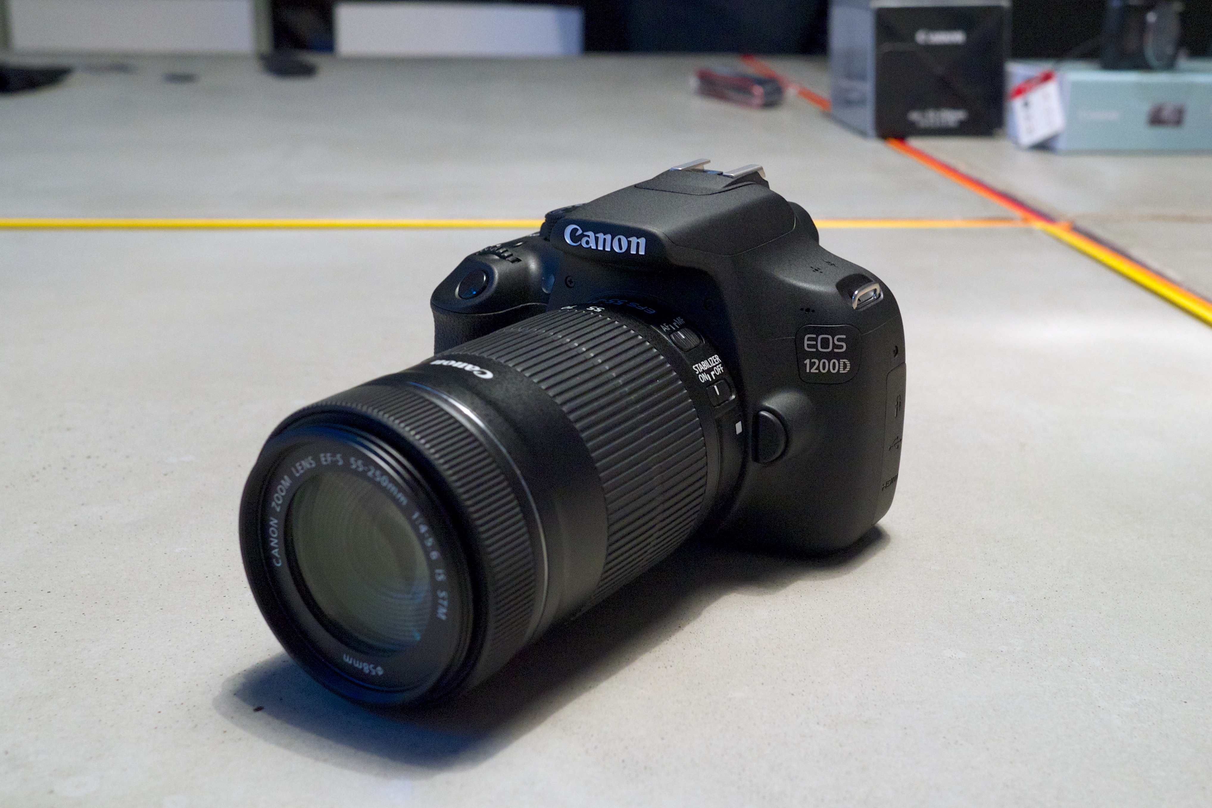 Canon EOS 1200D.